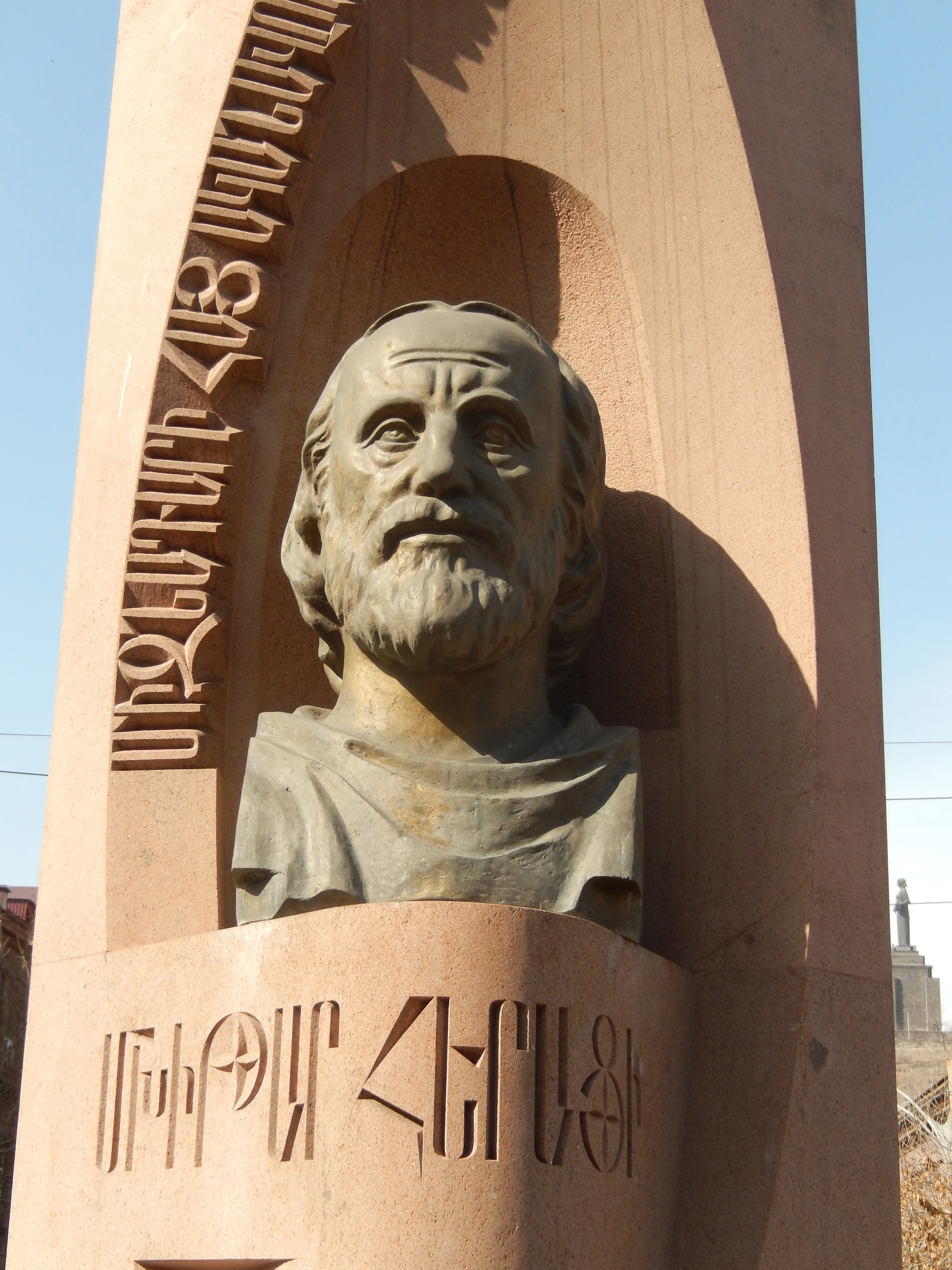 Քանդակագործ` Յուրի Պետրոսյան, ճարտարապետ` Ասլան Մխիթարյան